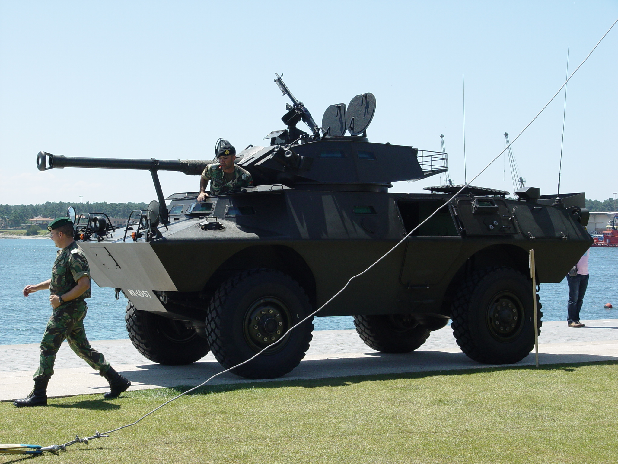 Cadillac Gage V-150, do Exército português, durante o Dia de Portugal em Viana do Castelo.